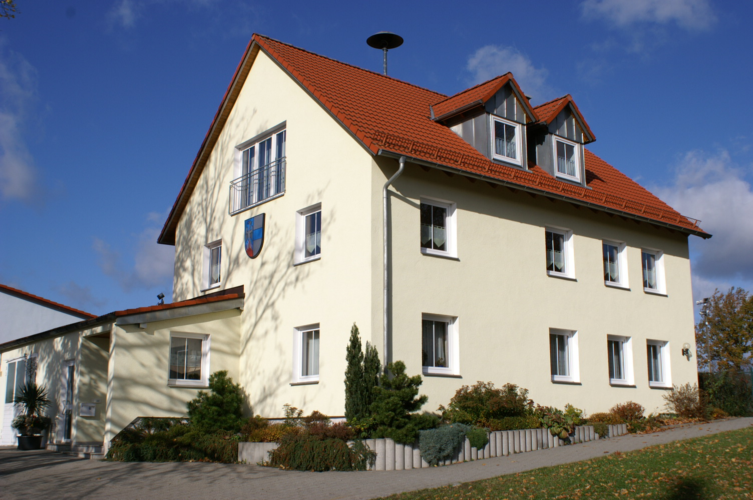 Das Rathaus der Gemeinde Bechtsrieth, fotografiert von Südosten